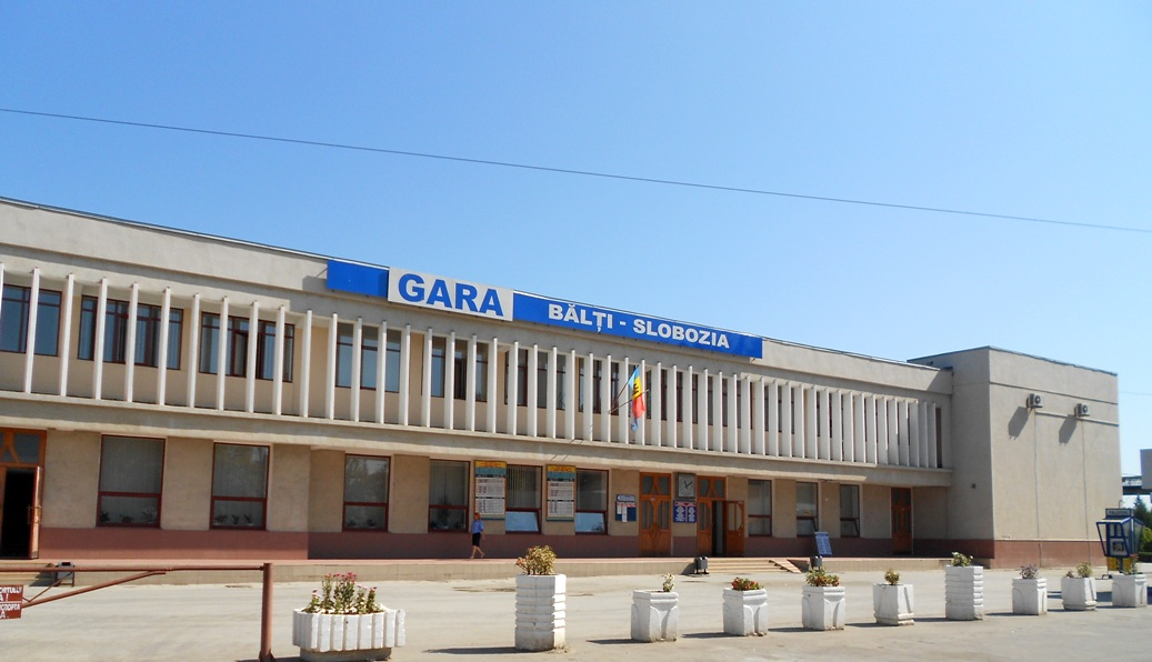 Gara Bălţi-Slobozia din Bălţi